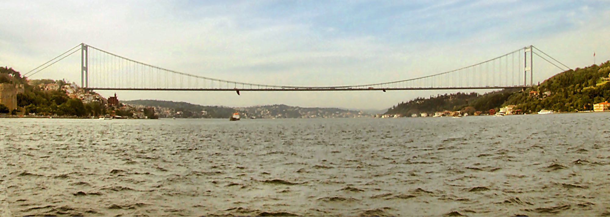 Stambuł, most Mehmeda Zdobywcy; Istambul, Fatih Sultan Mehmet bridge